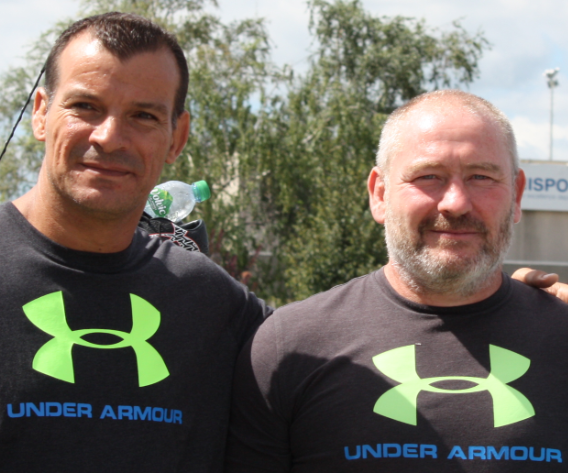 Asm Clermont